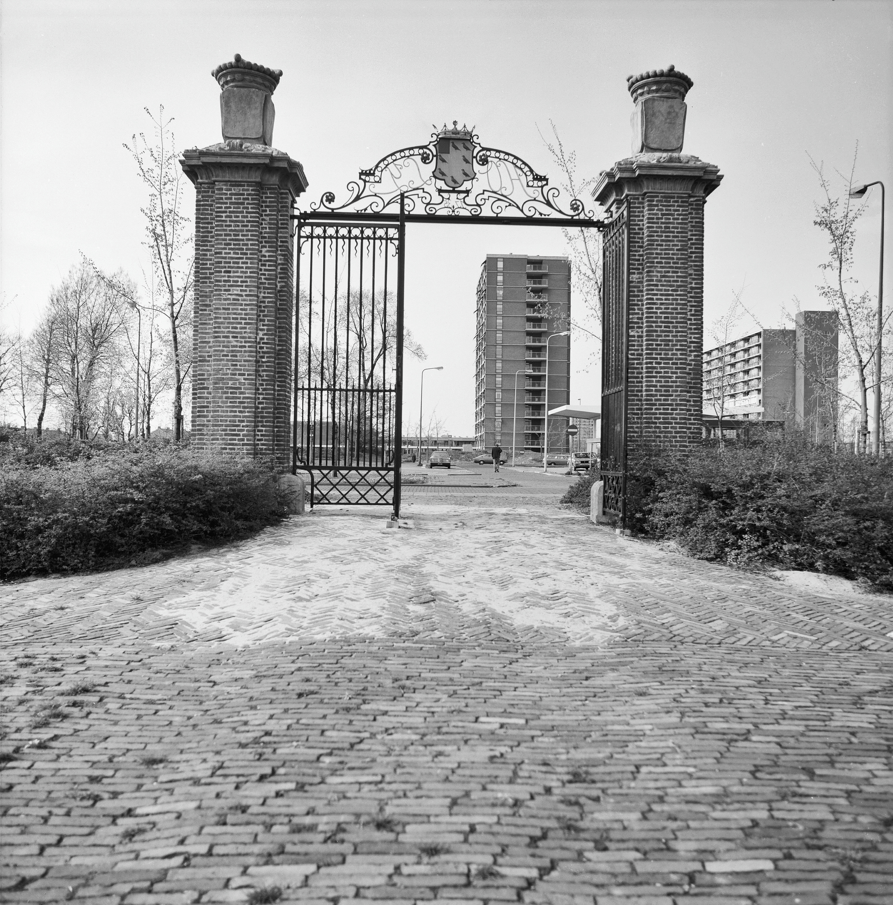 inrijhek naar het Rosarium afkomstig van het landgoed Holy